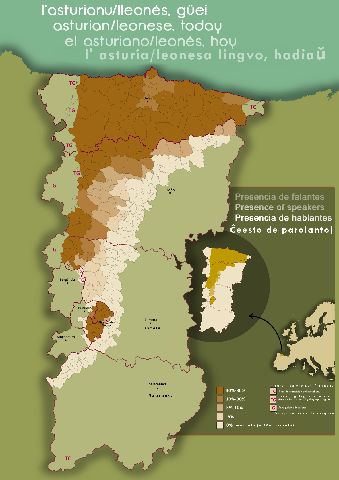 Mapa de la estensión de la llingua asturiana